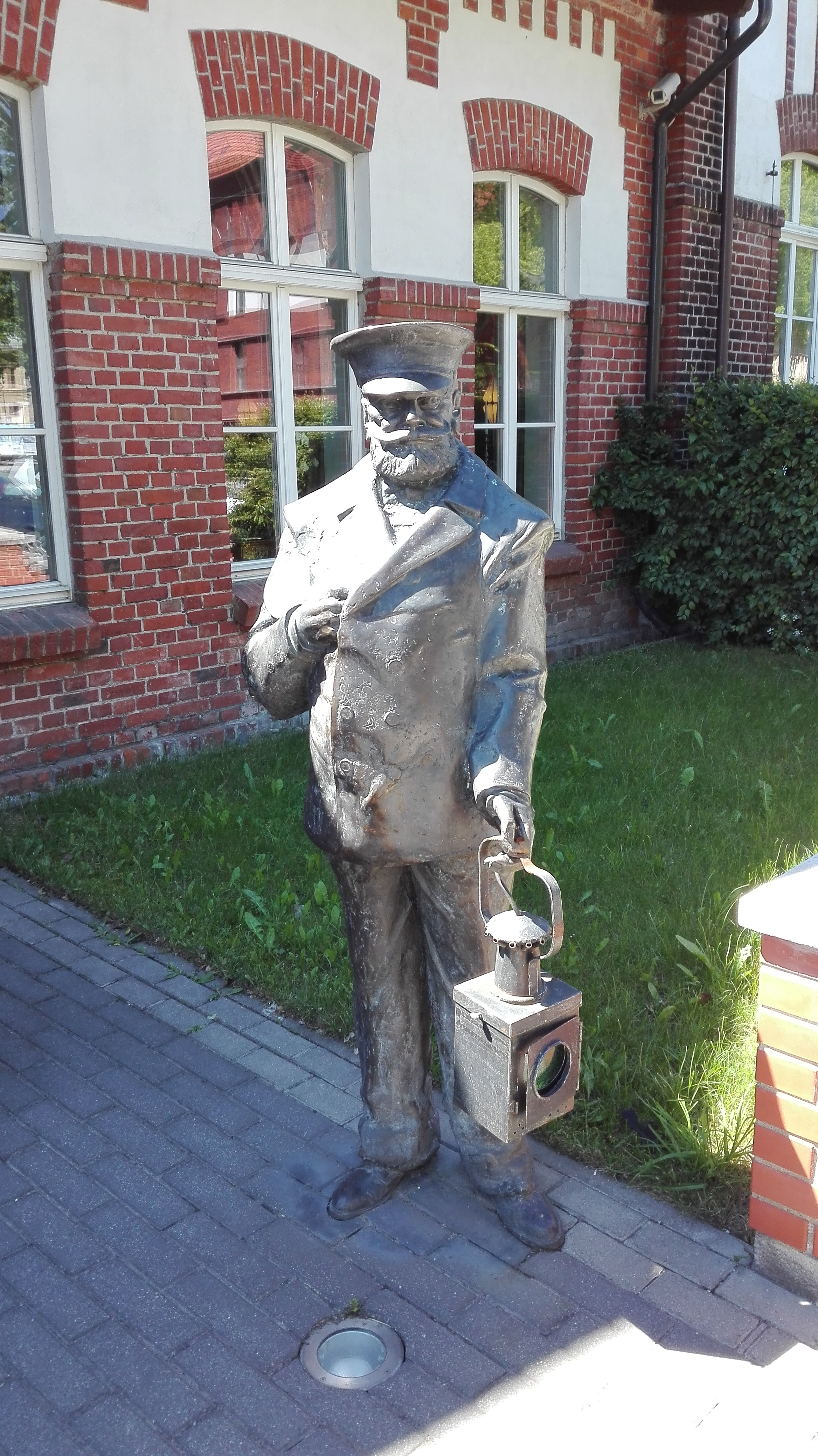 Skultūra prie buvusios Klaipėdos siauruko geležinkelio stoties